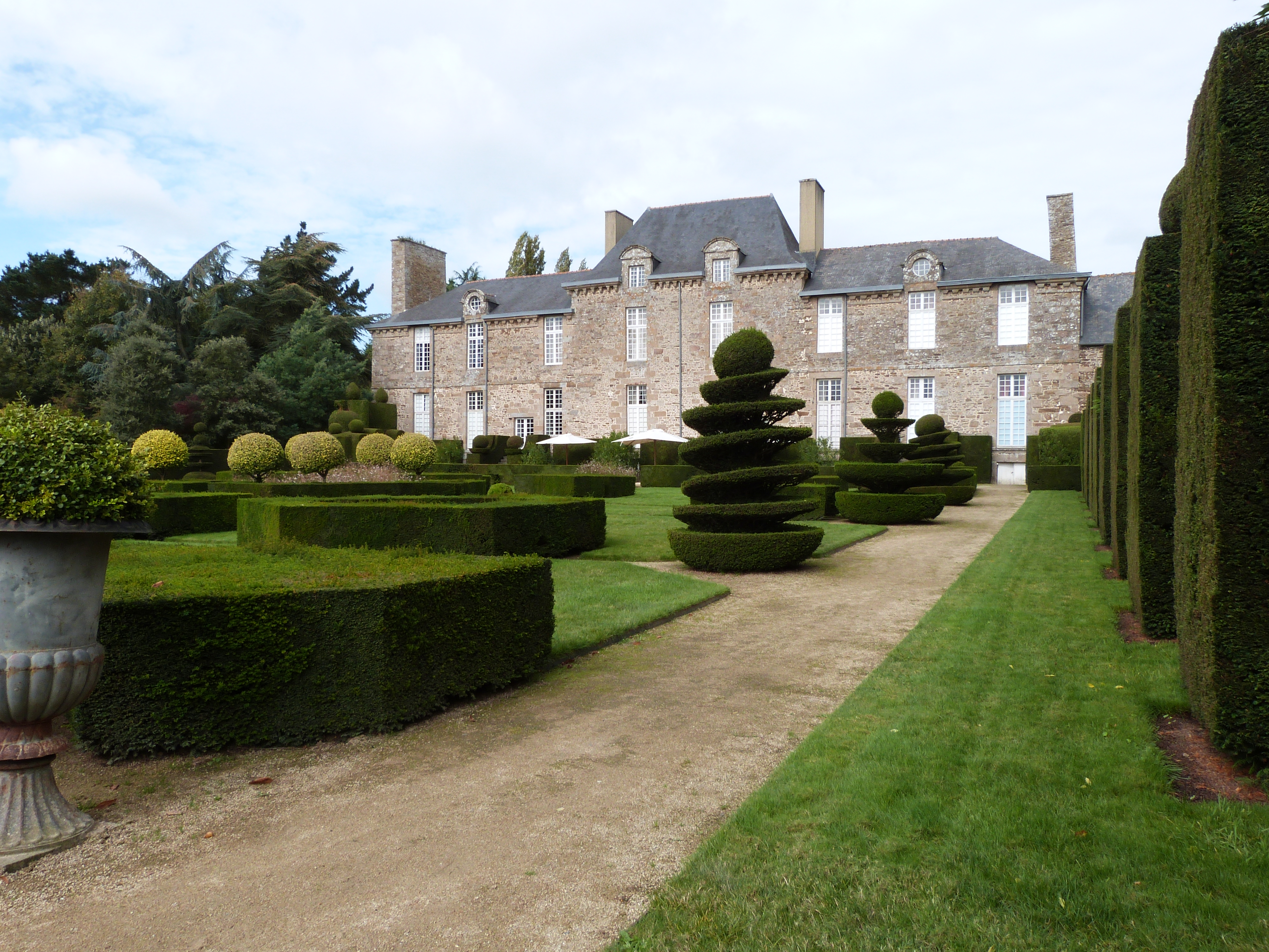 Façade sud du château de la Ballue et jardin régulier de François Hébert-Stevens